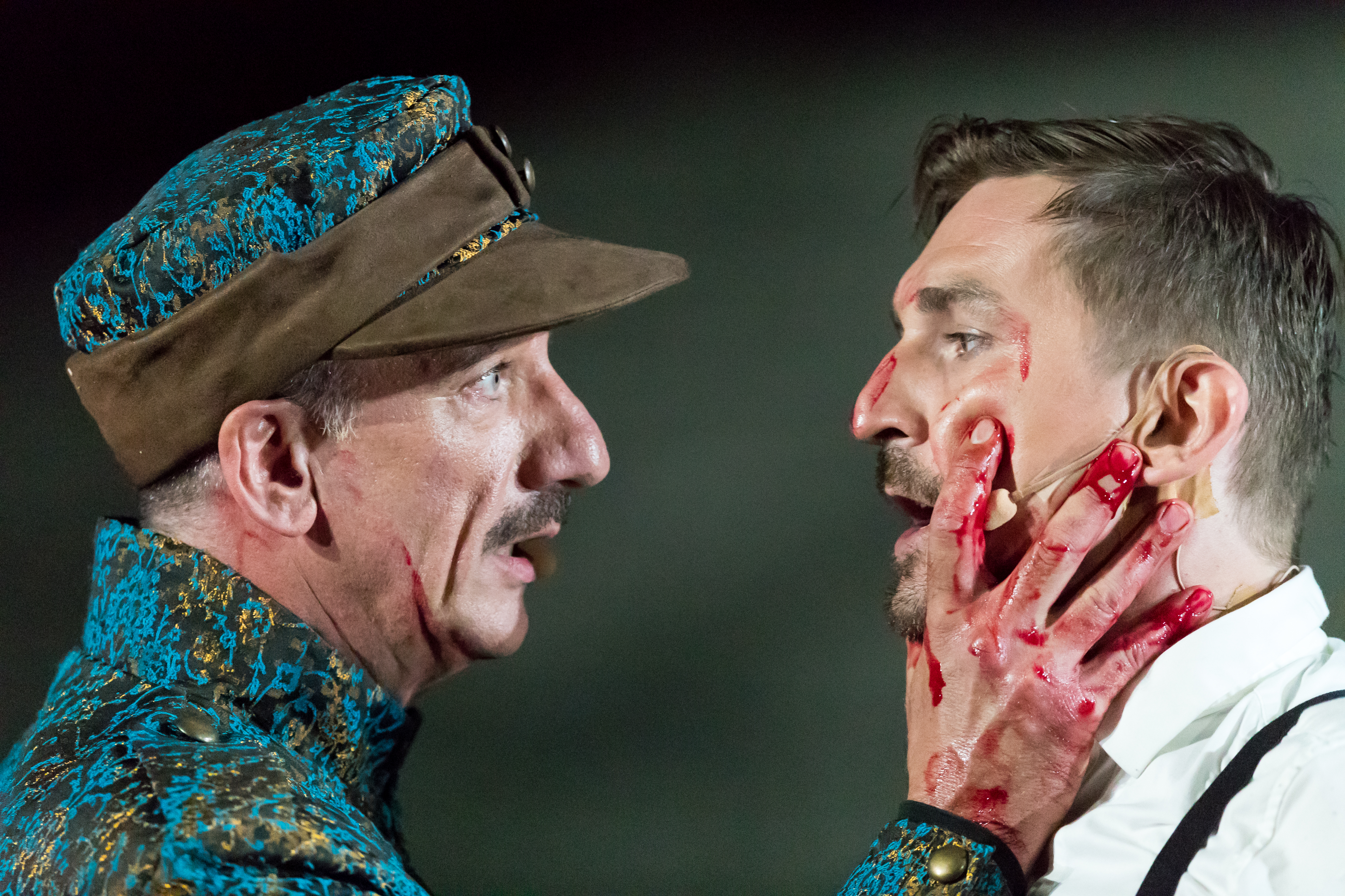 Miscellaneous during Nibelungenfestspiele "GLUT. Siegfried von Arabien." at Rheinland-Pfalz, Worms, , Germany on 2017-08-01, Photo: Sven Mandel